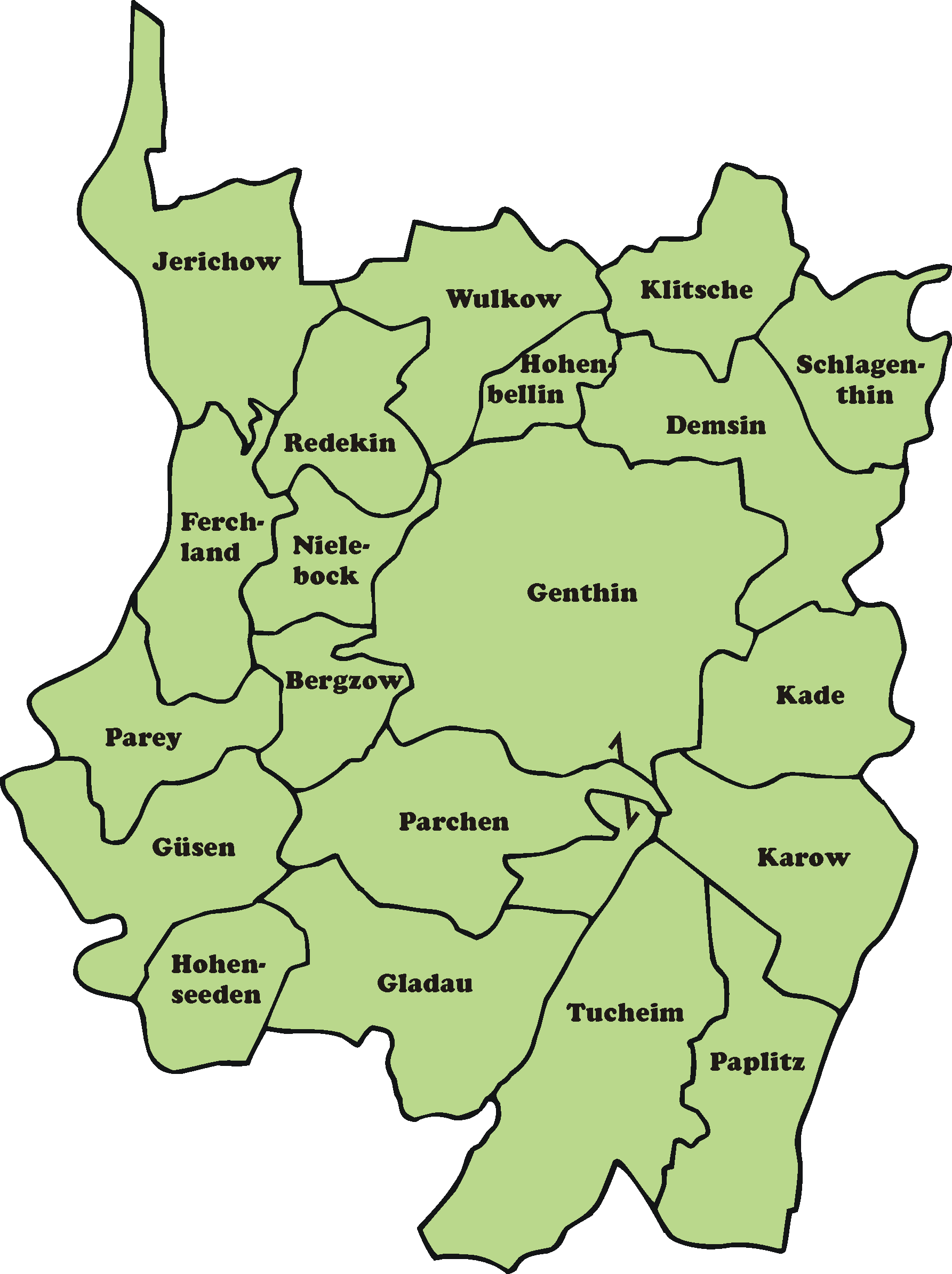 erstellt durch T.Rystau (Ollemarkeagle)